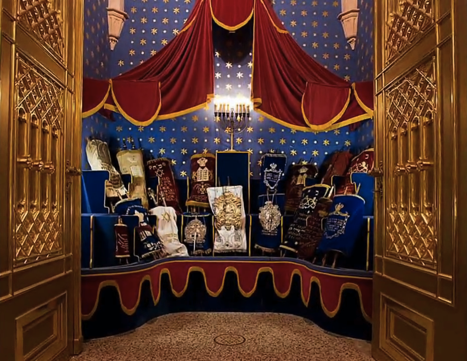 A frigyszekrény a tórákkal (Dohány utcai zsinagóga, Budapest)